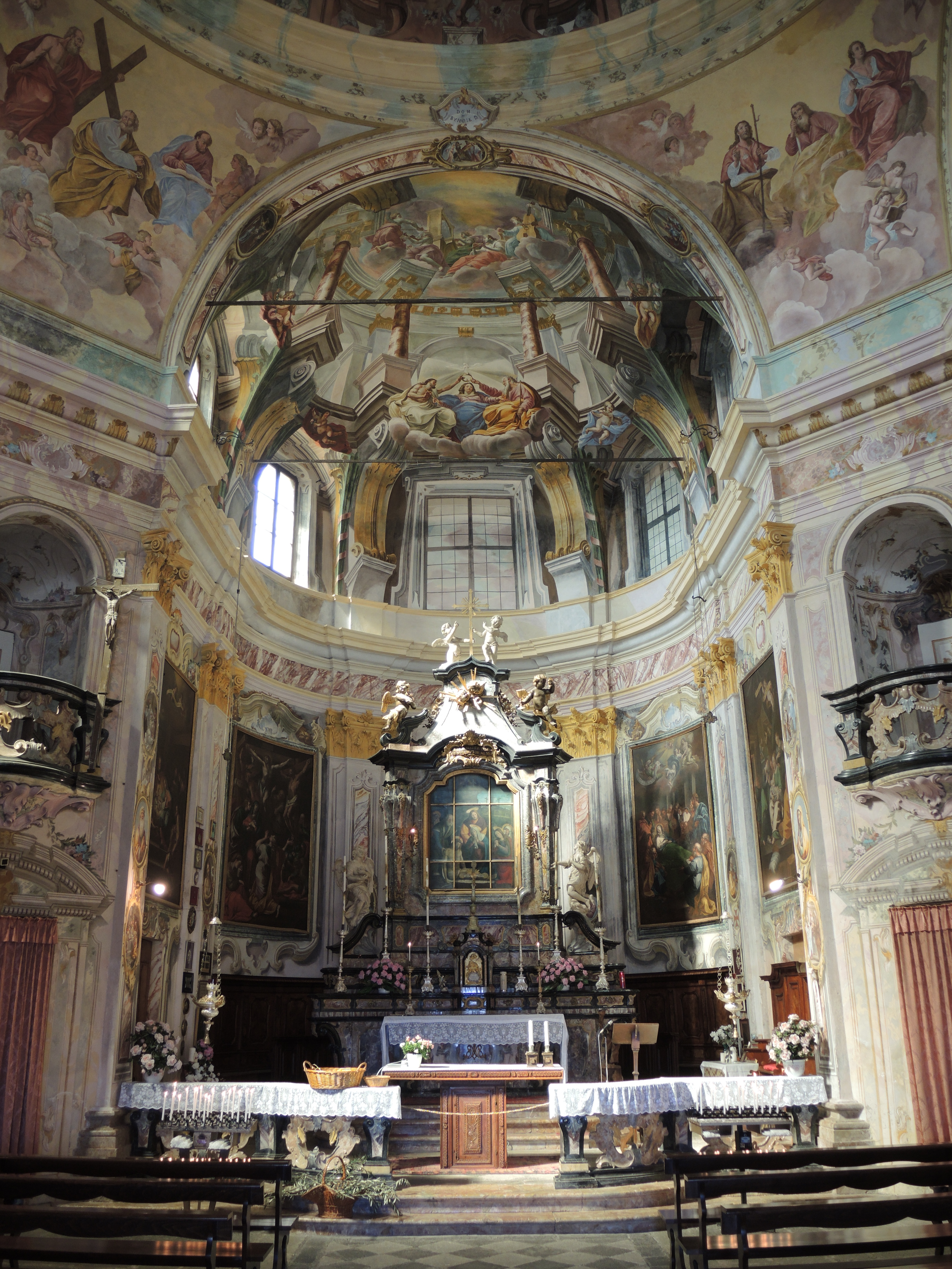 Boleto: Santuario della Madonna del Sasso